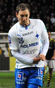 Marcus Falk-Olander